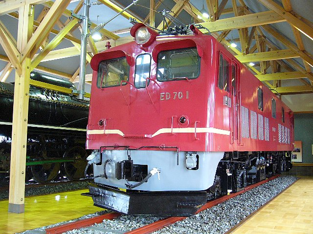 ED70-793 長浜鉄道スクエア内の北陸線電化記念館にて